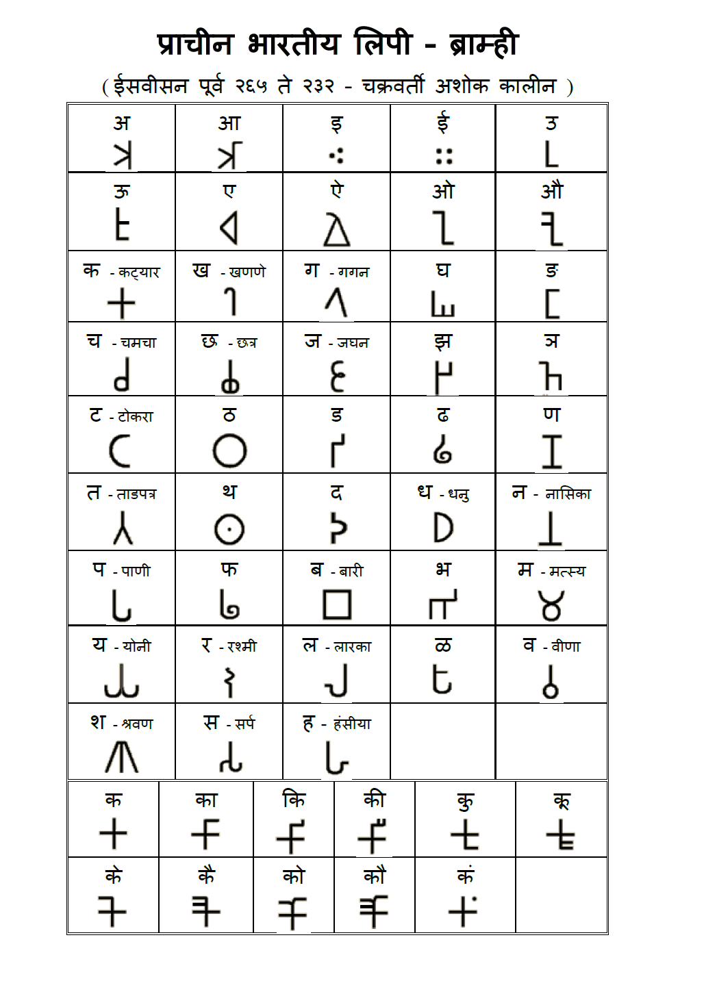 Chart of Bramhi Alphabets (Vovels and Consonants)